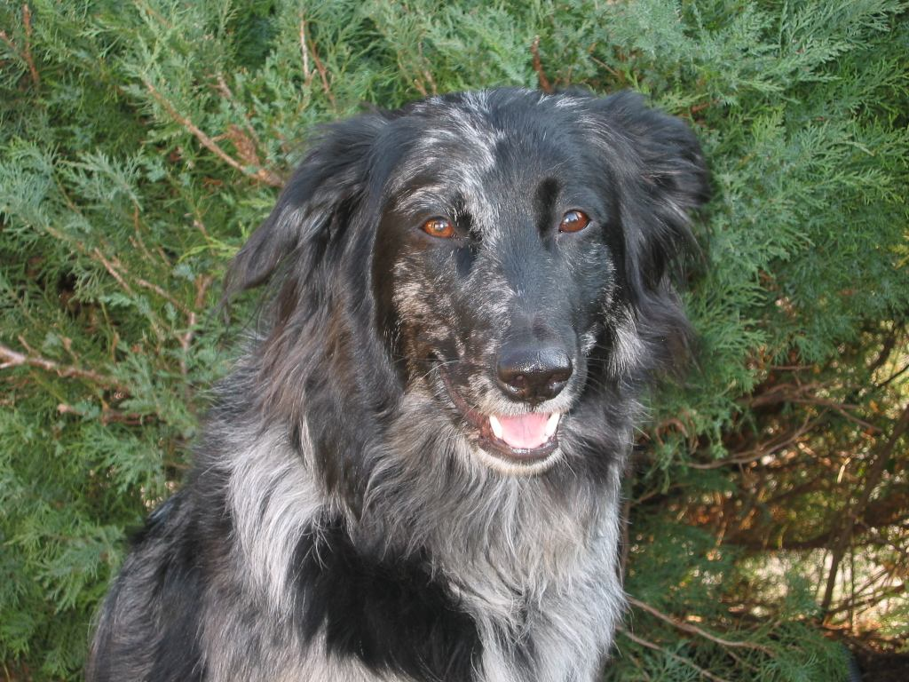 Altdeutscher Hütehund, Tiger